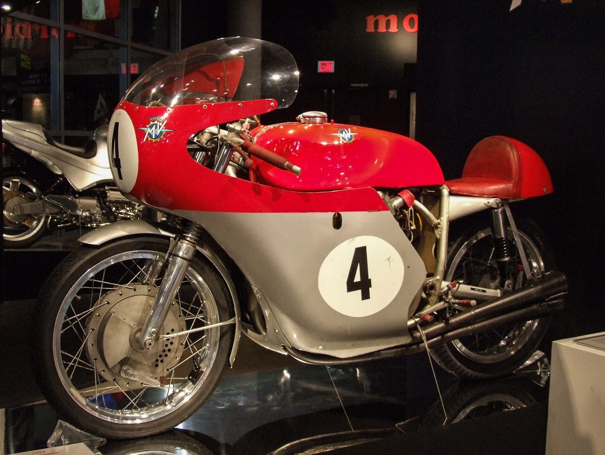 MV Agusta 500/4 (1954) im Barber Vintage Motorsports Museum, Birmingham Alabama USA